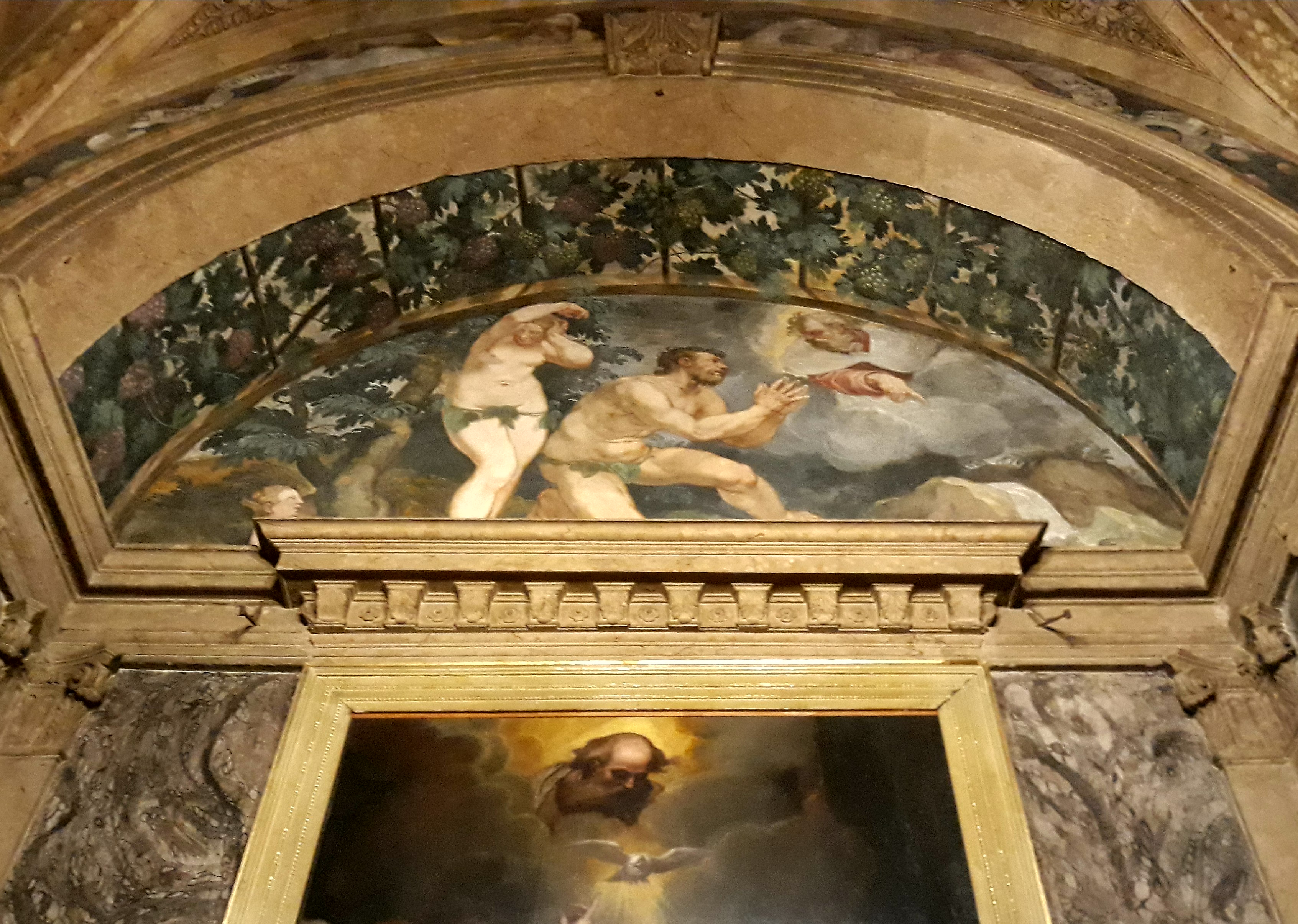 Rappresentazione di Adamo ed Eva cacciati dal Paradiso terrestre di Paolo Farinati per il secondo altare di destra della chiesa dei Santi Nazaro e Celso di Verona